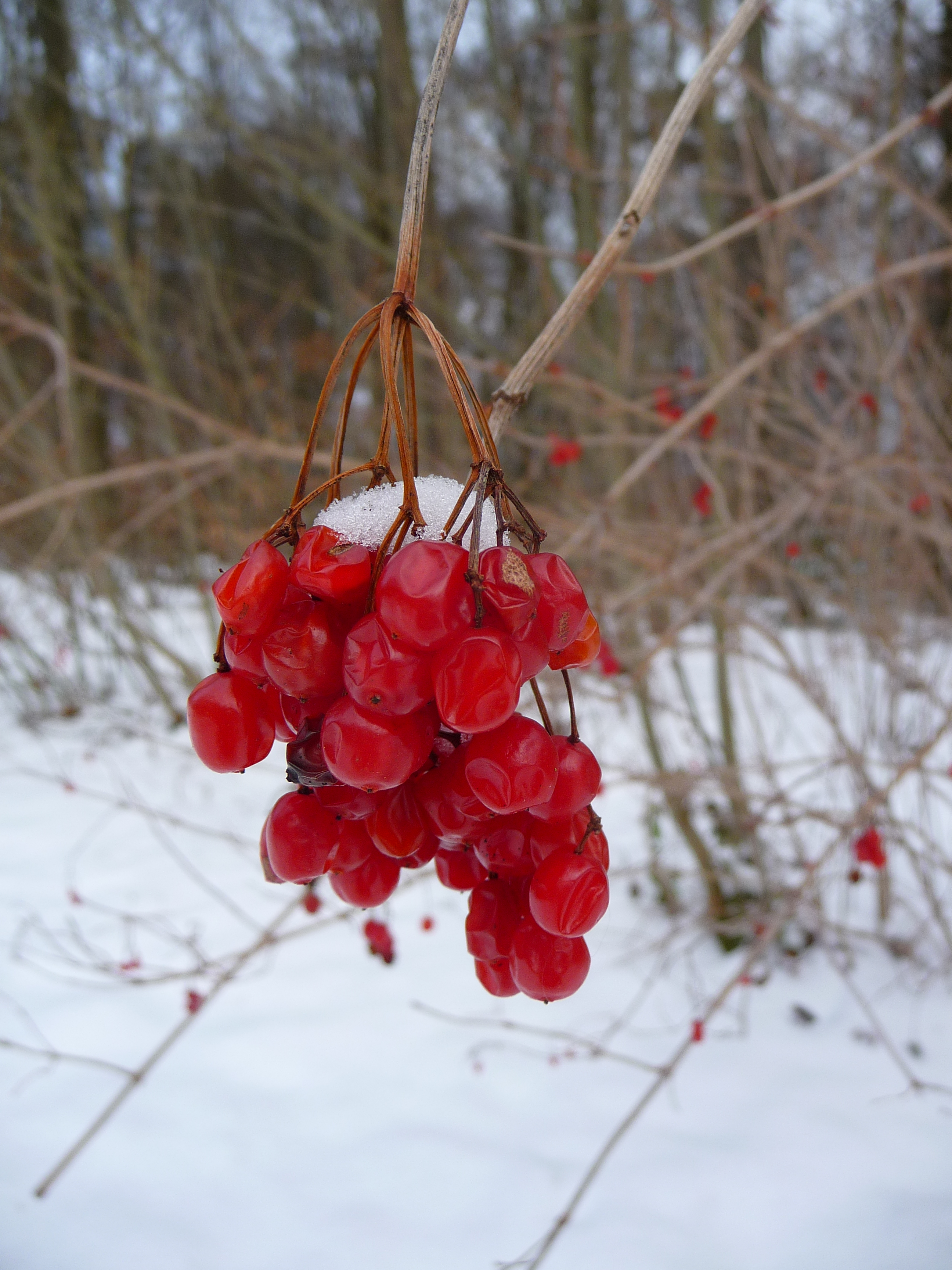 Früchte des Gewöhnlichen Schneeballs, Viburnum opulus, fotografiert in Heidelberg (Baden-Württemberg, Deutschland)